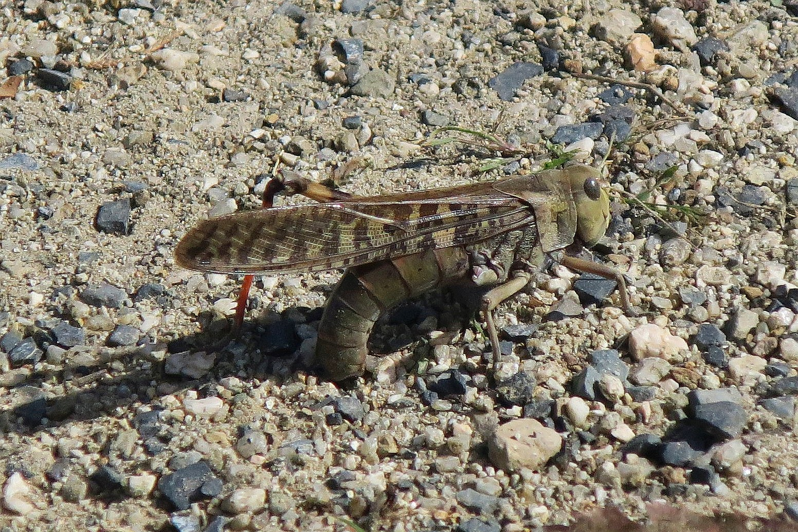 トノサマバッタの産卵